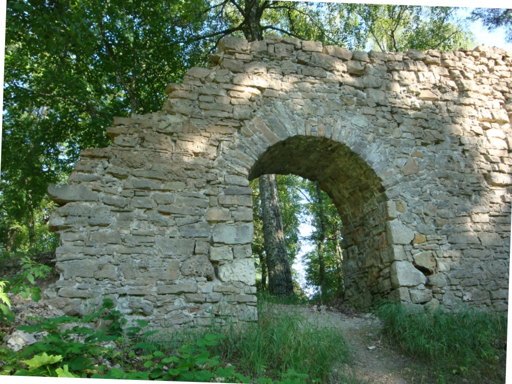 Konvendihoone varemed.